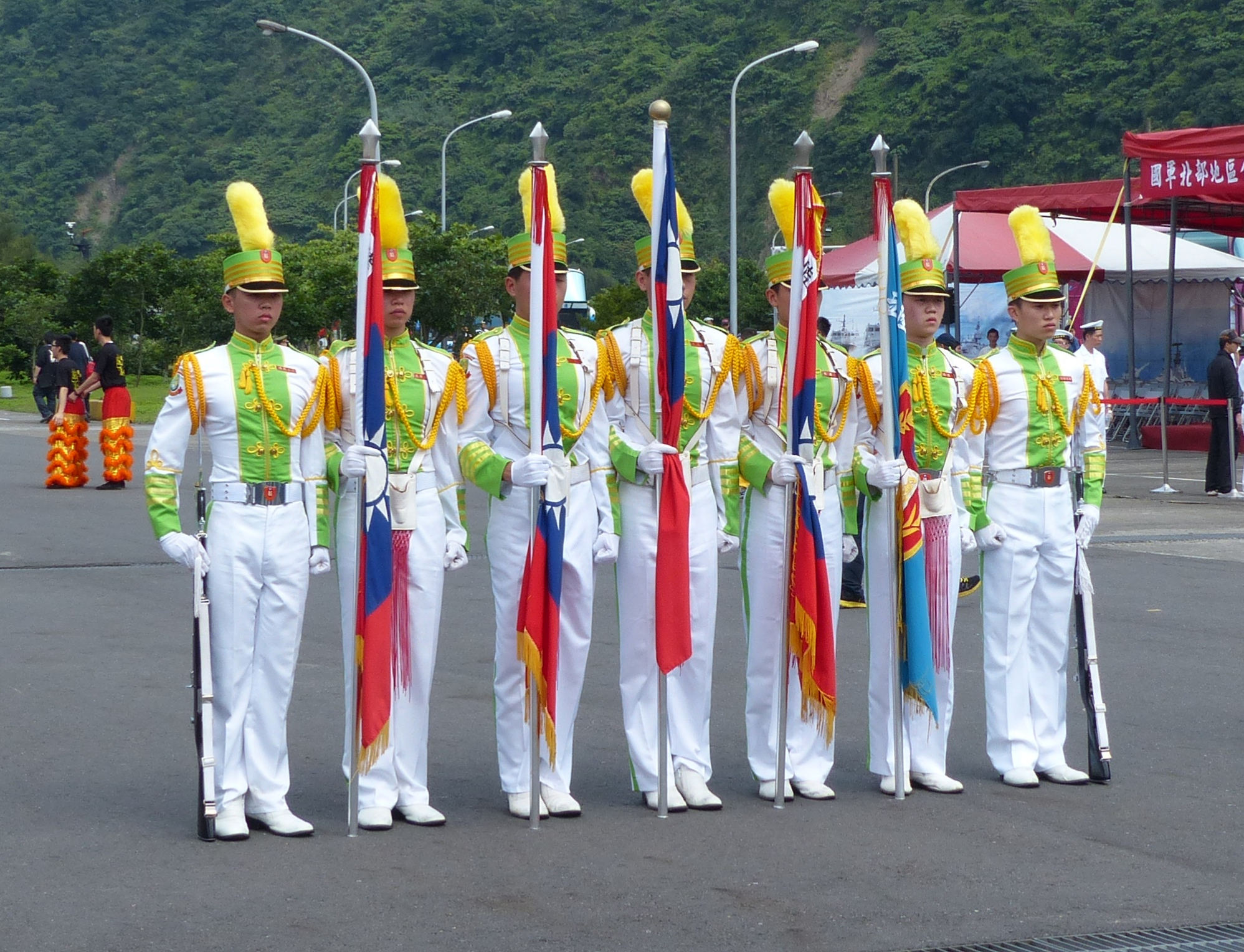 2013年中正軍港營區開放活動，陸軍專科學校鼓號樂旗隊練習中，列隊肅立的旗手。